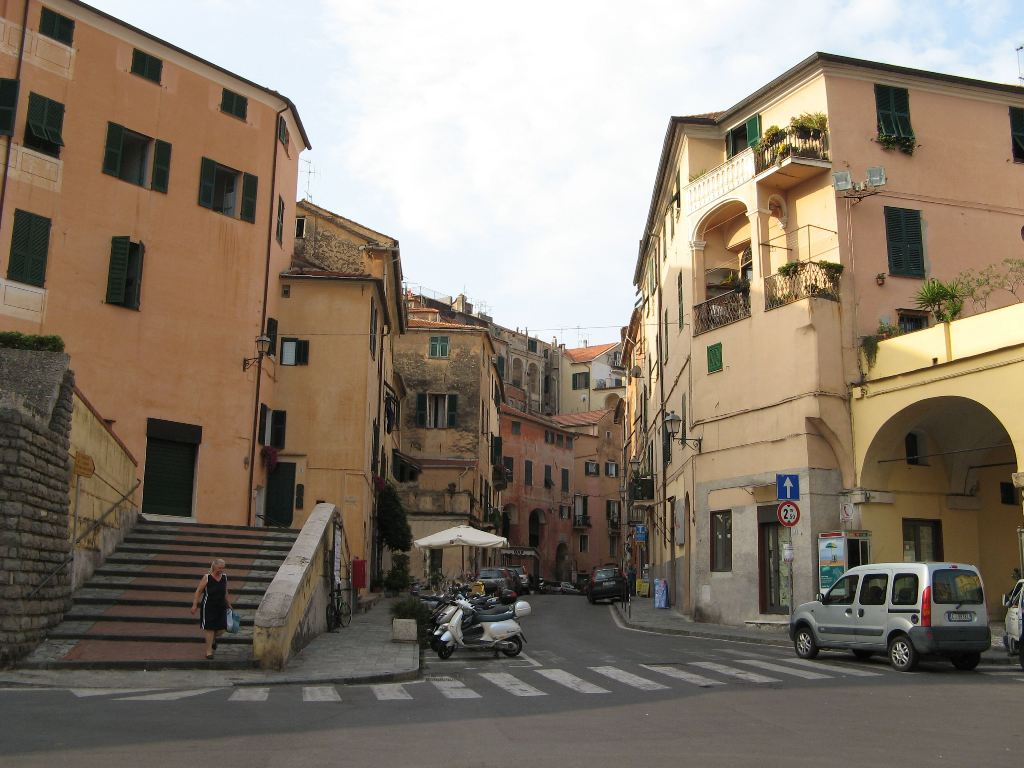 l'antico centro urbano del Parasio, detto "Ina Strà", Porto Maurizio, Imperia (Italy)